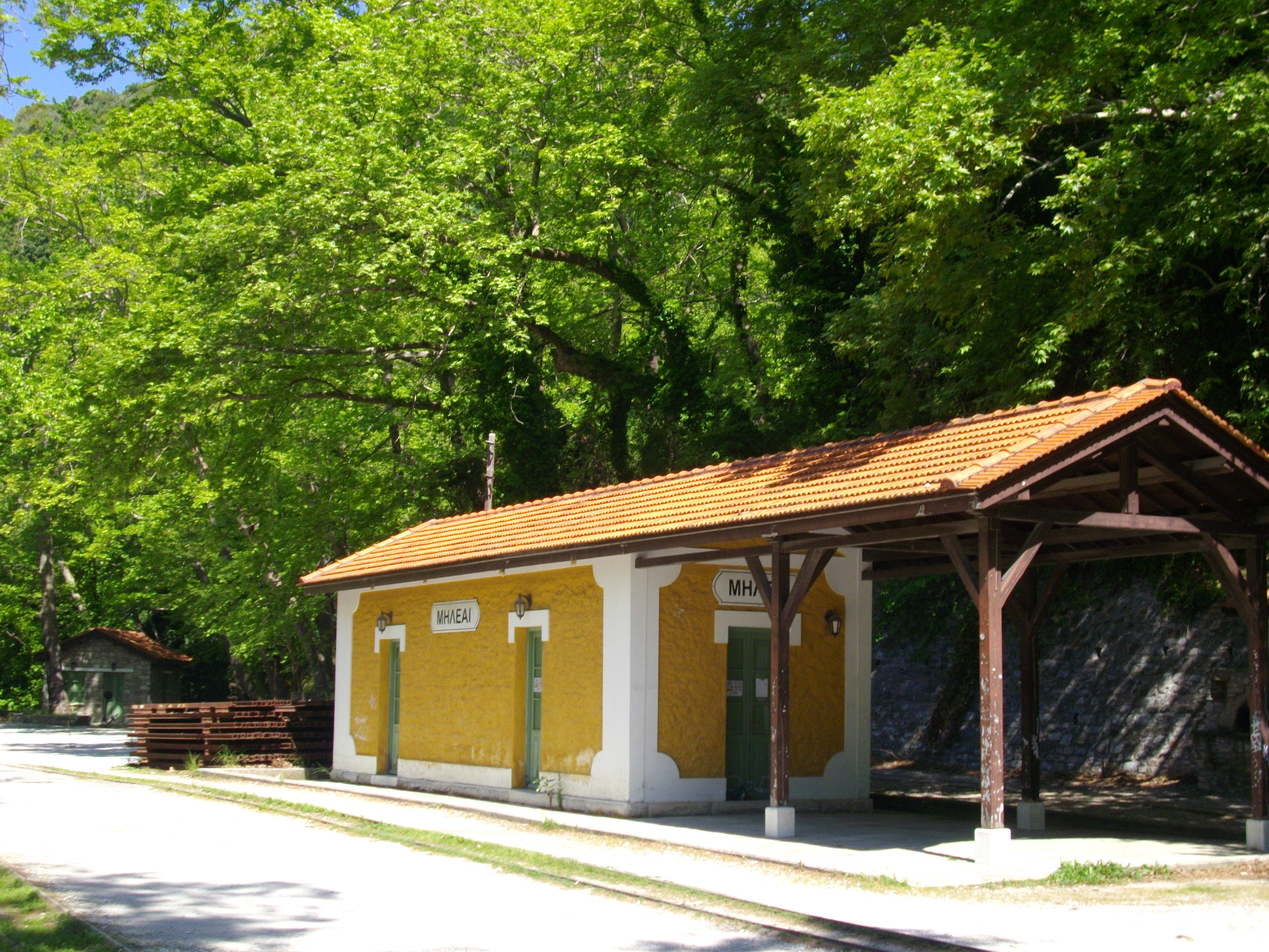 Pilion Train station at Milees (Milies)